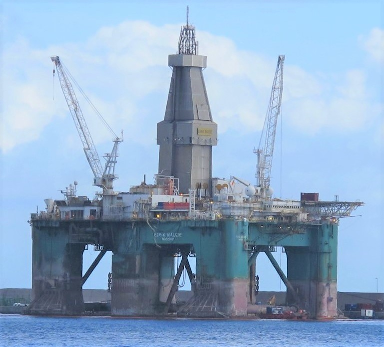 La Plataforma petrolifera "Eirik Raude" en el muelle Reina Sofía del puerto de La Luz y Las Palmas de Gran Canaria. Una de las plataformas petrolíferas flotante más grande del mundo, "Eirik Raude",llegó el pasado lunes al puerto de Las Palmas de Gran Canaria, donde permanecerá unos dos meses para una revisión y puesta a punto general. Esta plataforma pesa más de 37.000 toneladas, mide casi 120 metros de alto por 110 de eslora y 80 de manga y su magnitud obligó a una maniobra de atraque de casi dos días, en el dique Reina Sofía, lugar donde permanecerá hasta su marcha. Su propietaria es la empresa Ocean Rig y está previsto que en su reparación intervengan gran número de empresas del puerto de Las Palmas de Gran Canaria. Eirik Raude se completó en 2002 como una unidad de perforación de quinta generación semi-sumergible construido para el Bingo 9000 de diseño. El casco fue construido en el astillero de Dalian en China, con equipamiento en los EE.UU. por Friede Goldman costa afuera y en Canadá por Irving Astillero de Halifax. Este equipo está diseñado para llevar a cabo las operaciones de perforación en aguas profundas hasta 10 000 pies. Eirik Raude se mantiene estable en condiciones climáticas adversas debido a sus características de movimiento superiores y avanzados sistemas de posicionamiento dinámico. La plataforma está totalmente preparadas para el invierno durante todo el año para operaciones en zonas climáticas extremas, tales como costa afuera de Canadá (Nueva Escocia y Terranova) y en el mar del norte de Noruega (Barents Mar). Eirik Raude se ha actualizado recientemente con un sistema de amarre de 8 puntos. El equipo de perforación perforado 4 pozos en el Mar de Barents bajo extremas condiciones climáticas adversas. Fuente y más información : Fotografías : Ver el video